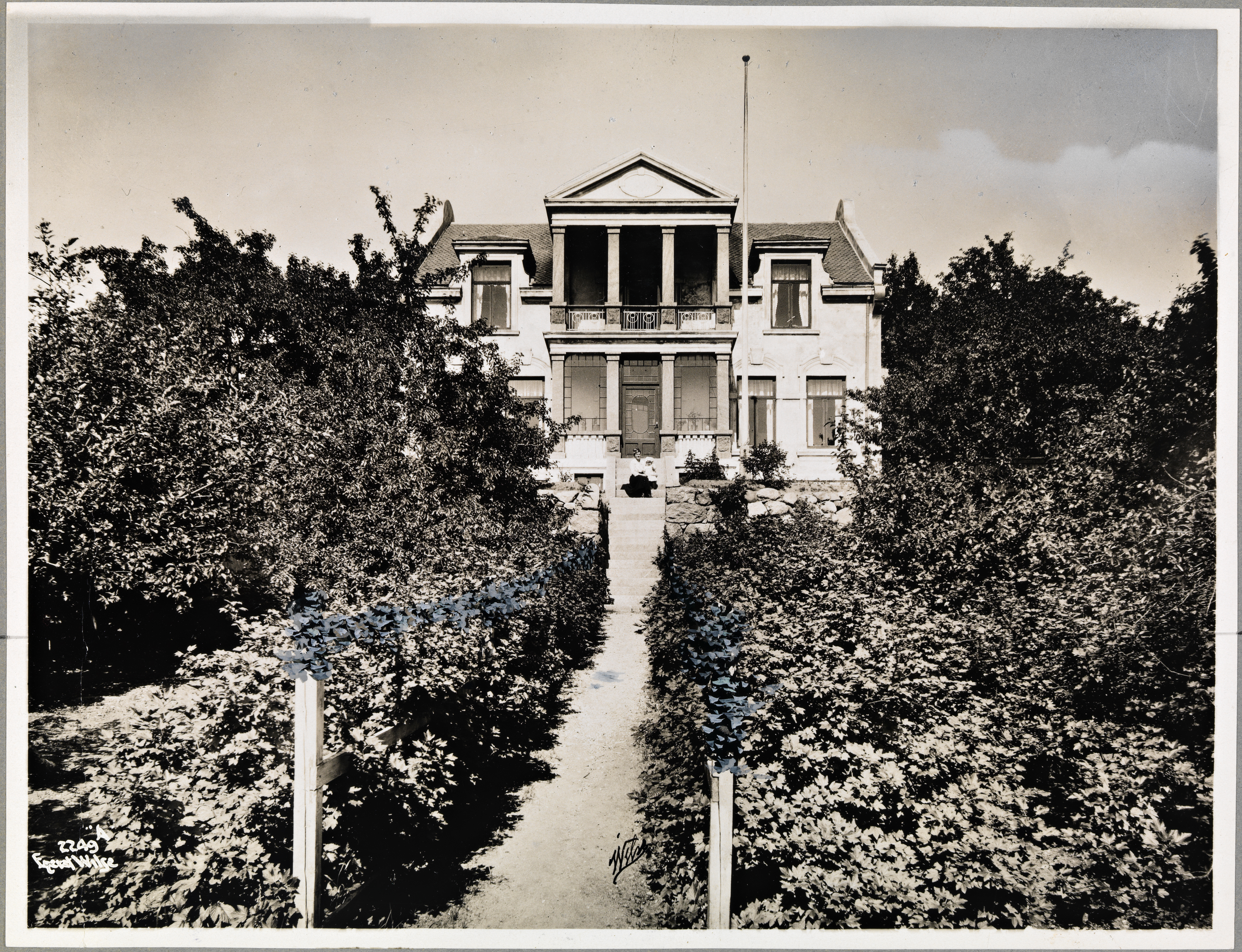 Beskrivelse / Description: Villaen hvor familien Hamsun bodde. En uidentifisert kvinne (sannsynligvis Marie Hamsun) sitter på trappa med et barn i armene. Bildet stammer fra Gyldendals historiske portrettarkiv. Dato / Date: juli 1917 Sted / Place: Vestfold, Larvik, Villa Havgløtt Fotograf / Photographer: Anders Beer Wilse (1865-1949) Digital kopi av original / Digital copy of original: s/h papirpositiv Eier / Owner Institution: Nasjonalbiblioteket / National Library of Norway Lenke / Link: Bildesignatur / Image Number: bldsa_Ha0056